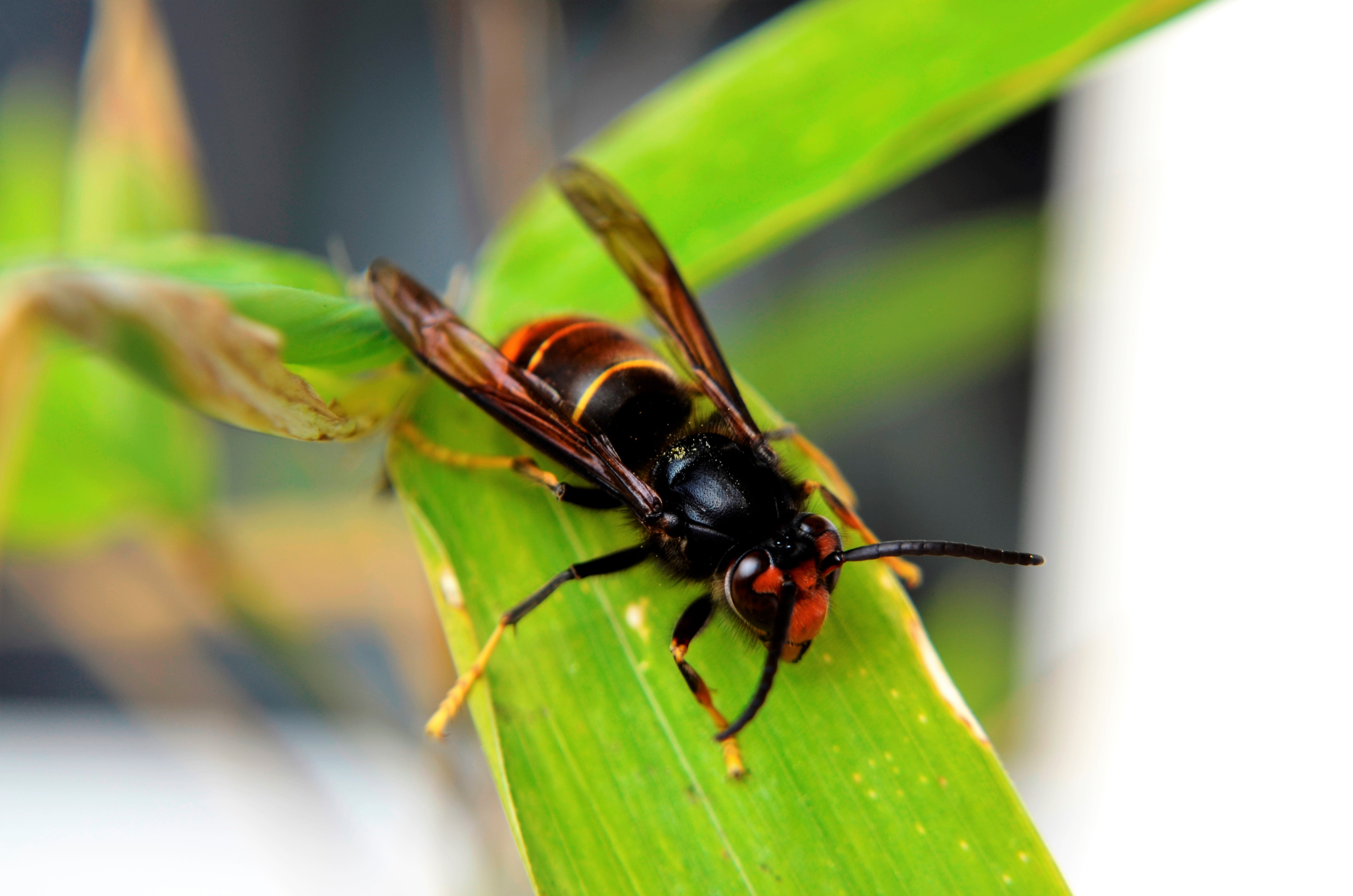 Vespa velutina (Frelon asiatique) sur une feuille de bambou à Poitiers (Union Européenne - FR).